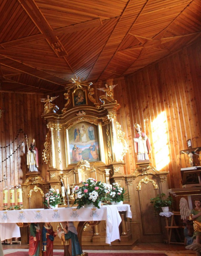 Zrekonstruowany ołtarz główny w kościele św. Jakuba Apostoła w Rozdzielu